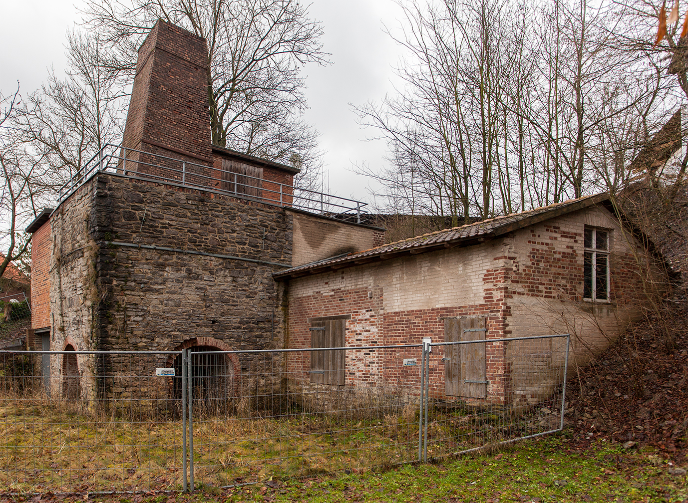 Kalkofen Timmerberg in Nammen (ehemaliges Baudenkmal von Porta Westfalica, 2013 abgerissen)